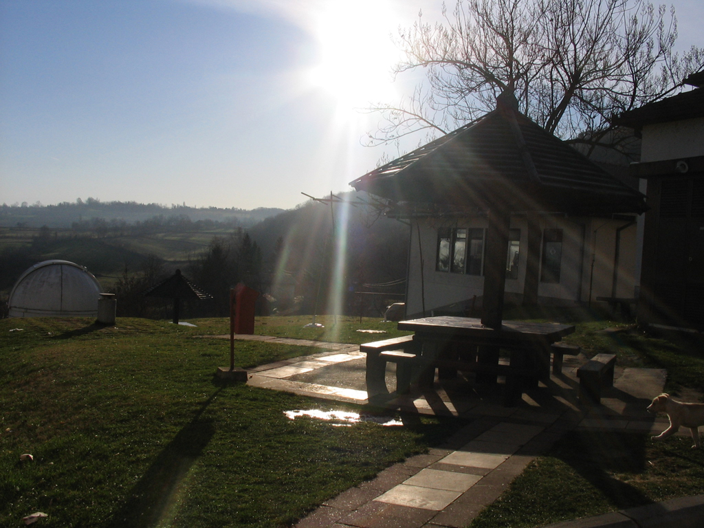 Zimní den ve výzkumné stanici Petnica u Valjeva, Srbsko